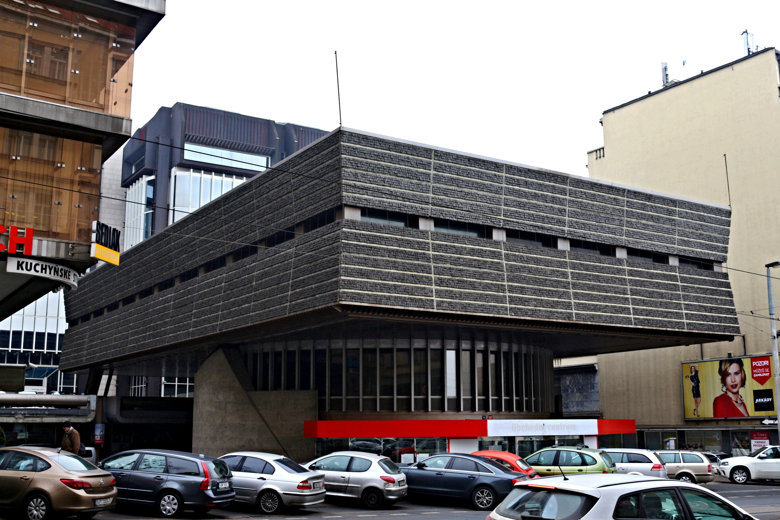 Vinohradská, dispečink Transgas (VZP)